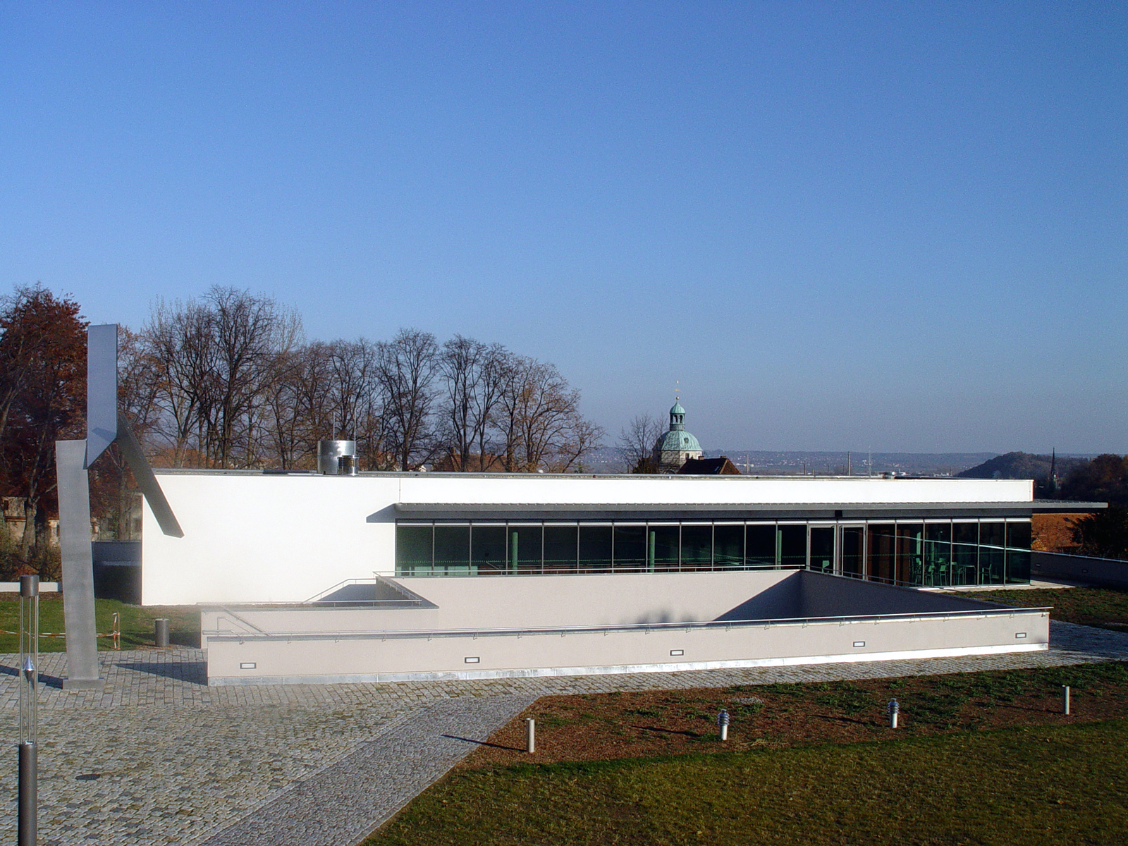 Sächsisches Landesgymnasium Sankt Afra - Internatsgelände - Mensa